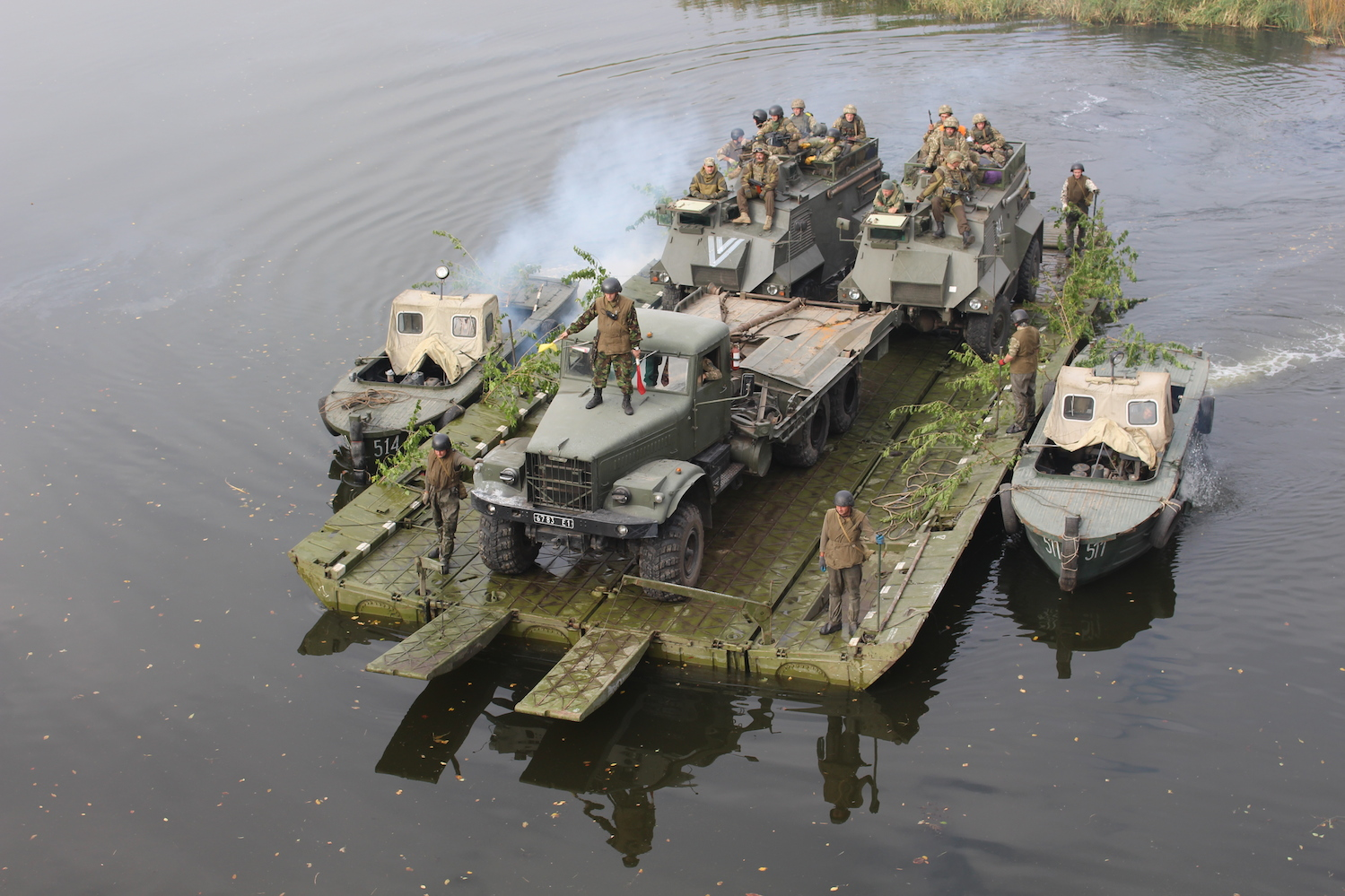 На одному із полігонів у Дніпропетровській області тривають бригадні тактичні навчання з десантуванням та бойовою стрільбою 25 окремої повітрянодесантної бригади Високомобільних десантних військ Збройних Сил України. У навчаннях, в складі штатних підрозділів бригади, беруть участь понад тисяча резервістів, які проходять польовий вишкіл в умовах максимально наближених до бойових. Впродовж доби воїни-десантники успішно виконали низку визначених тактичних завдань. Зокрема, взяття під охорону мосту, забезпечення подальшого пересування підрозділам бригади водним та наземним шляхом, здійснення маршу, подолання водної перешкоди за допомогою понтонів та вплав бойовою технікою, тощо. Також, під час одного із етапів активної фази навчань відбулося десантування повітряного десанту з літаків Ан-26. Десантники висадилися на визначений майданчик приземлення та виконали завдання по знищенню умовного противника. Дії десантників підтримувалися тактичною, транспортною та армійською авіацією, реактивними, артилерійськими та іншими підрозділами. Слід наголосити, що під час навчань активно застосовується досвід особового складу, отриманий в районі проведення Антитерористичної операції. Фото Олександр Колесник